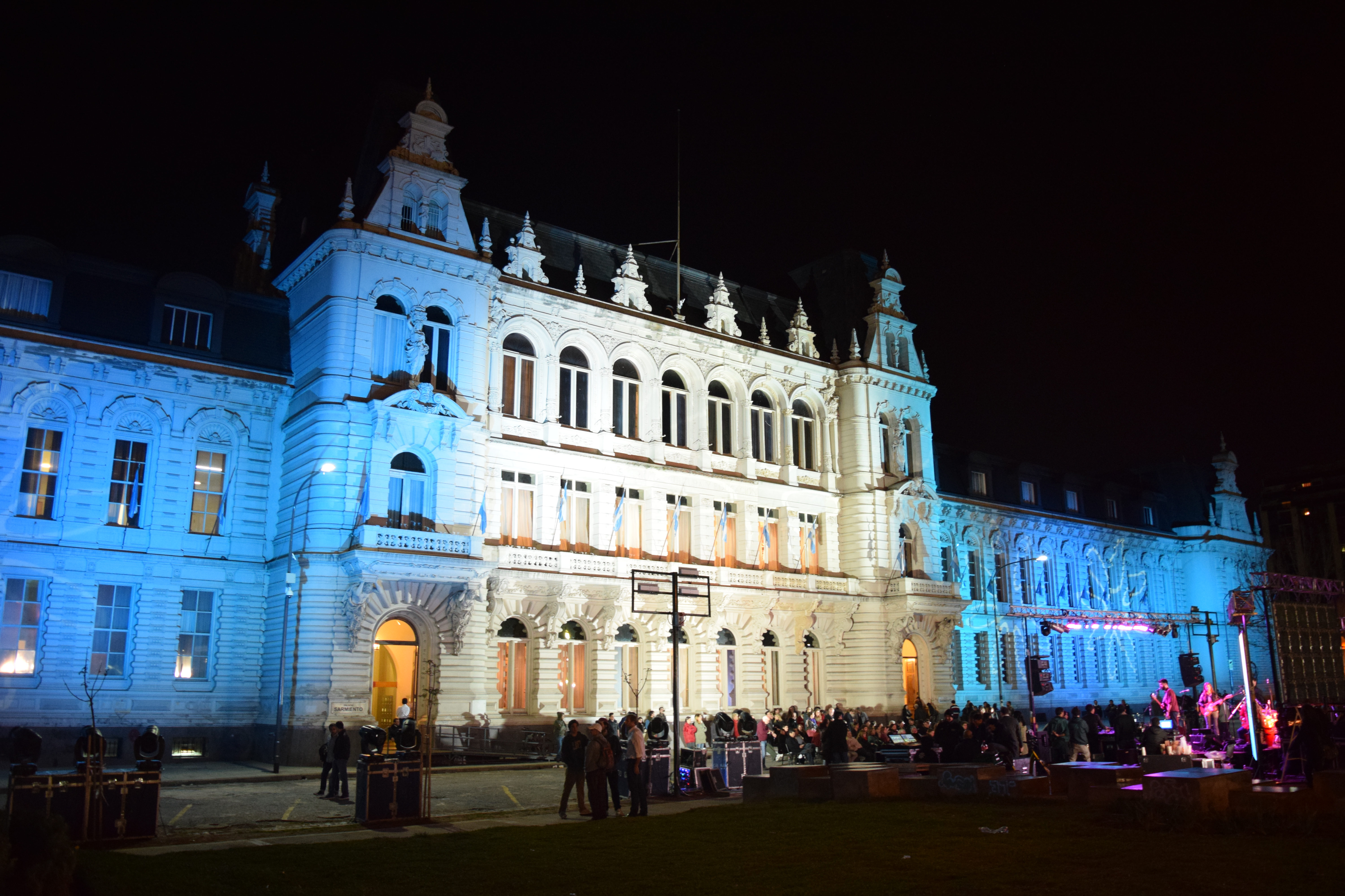 Palacio Pizzurno iluminado en la Noche de los Museos 2015. Buenos Aires, Argentina.